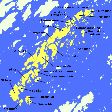 Karta över Skoboraden utanför Nämdö i Stockholms skärgård